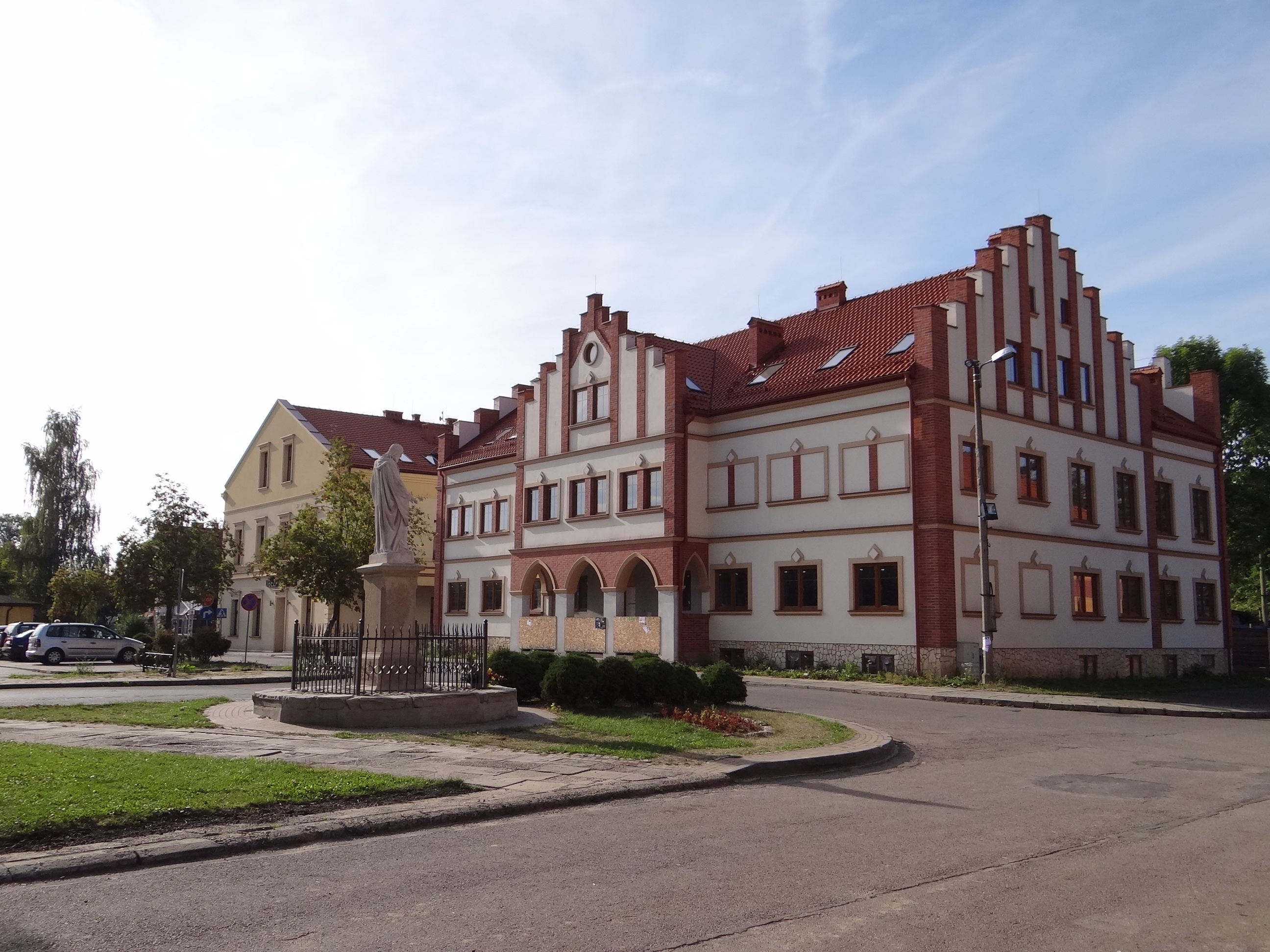 Zator